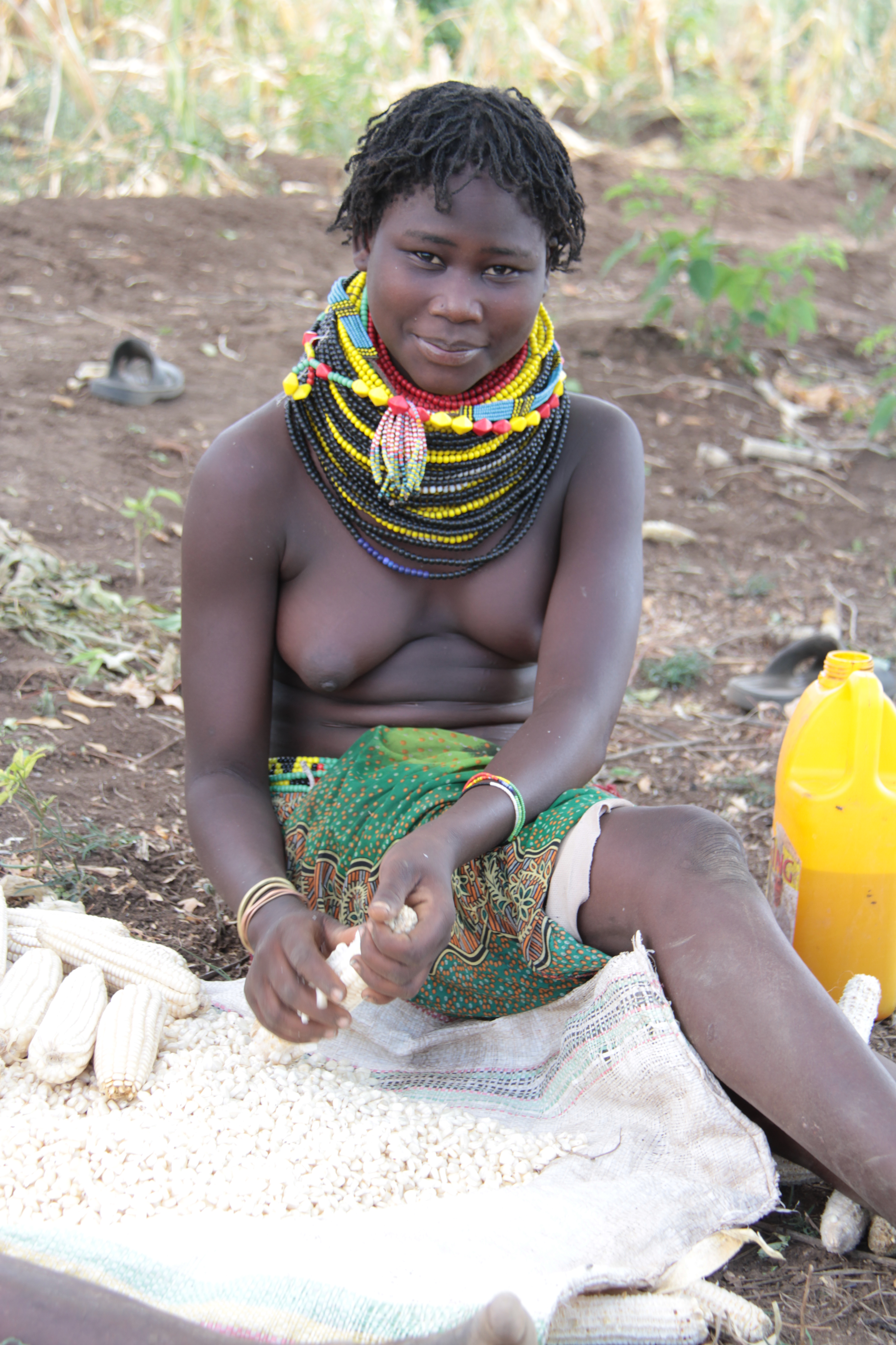 Ethiopie, jeune femme nyangatom